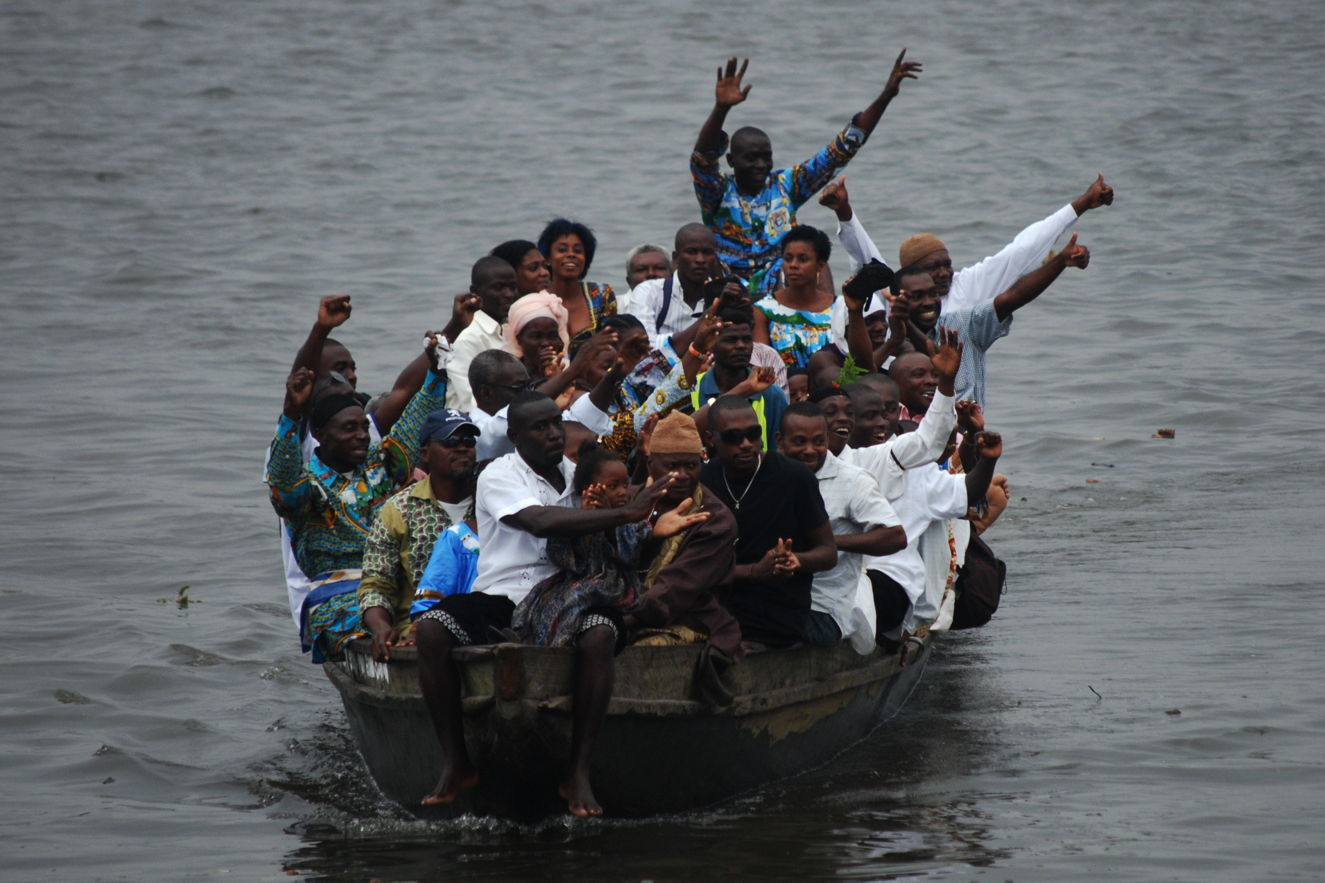 Spectateurs de la course de pirogues sur le fleuve Wouri à Douala au Cameroun. This is an image with the theme "Africa on the Move or Transport" from: Cameroon